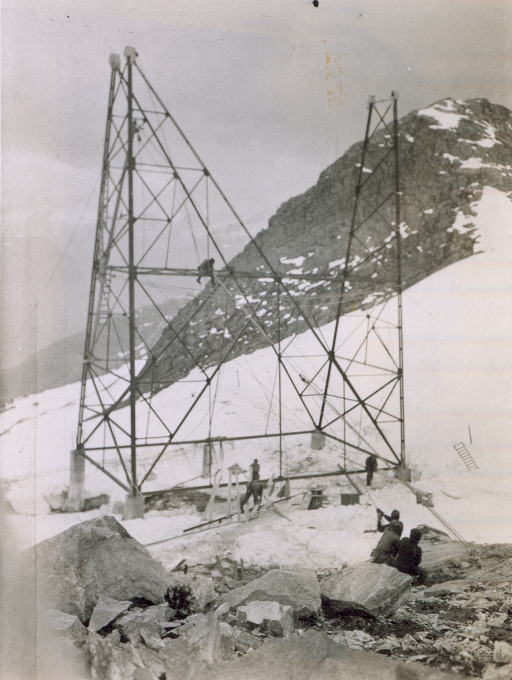 Bygging av mast (Tafjord kraftselskap). Elektrisitetsdirektoratet. Dato: xx.xx.xxxx.